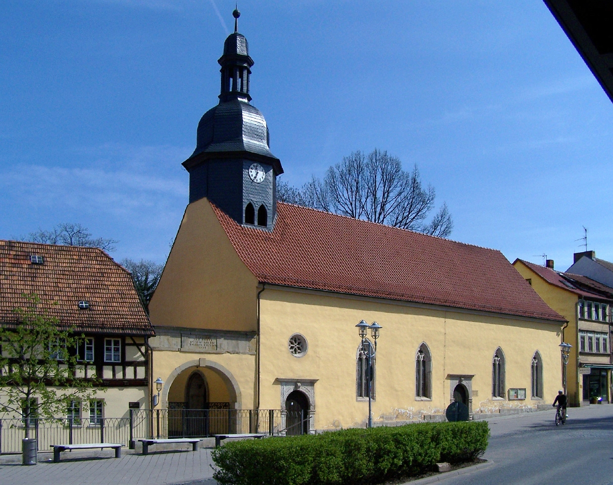 Annenkirche